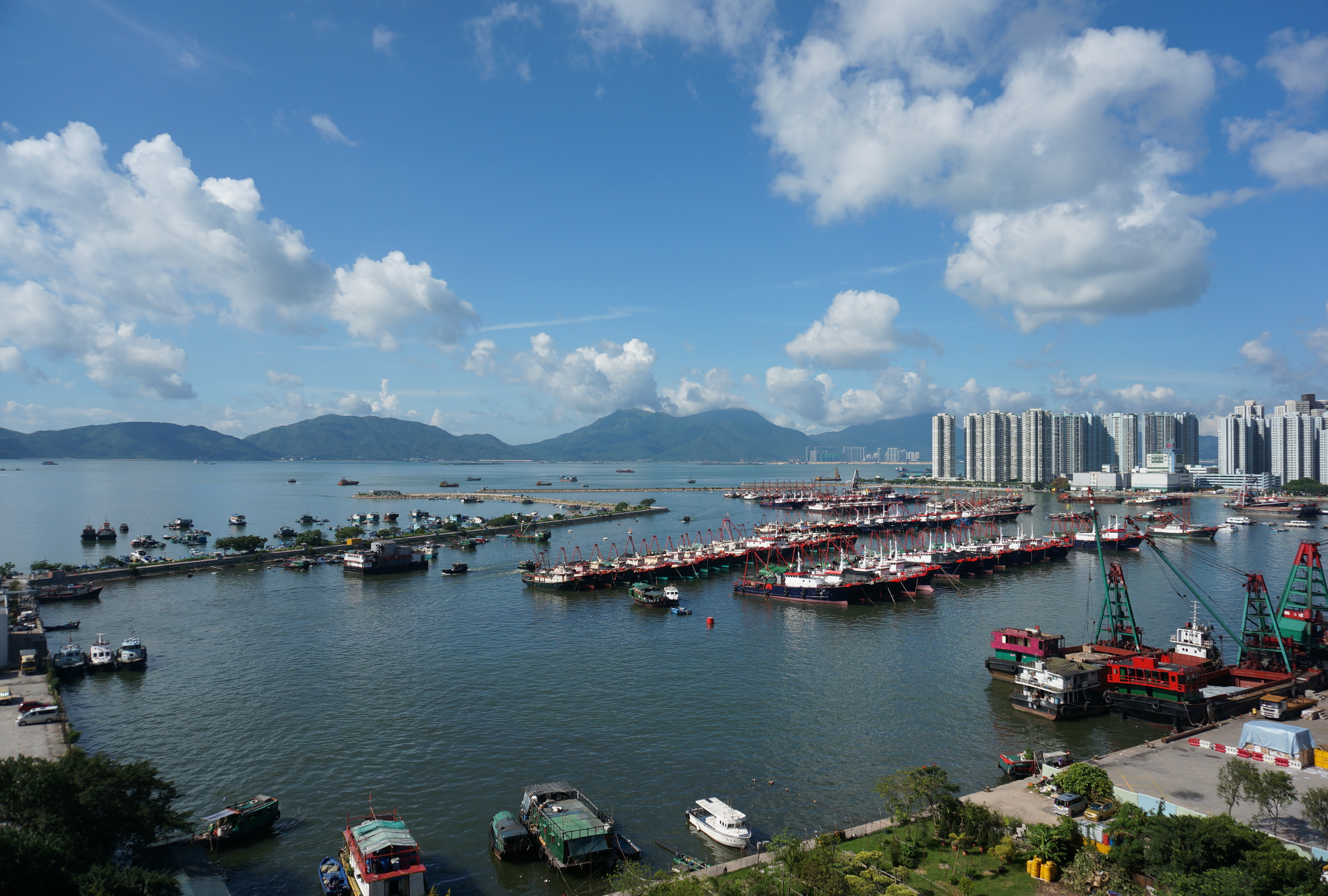 從三聖望向青山灣